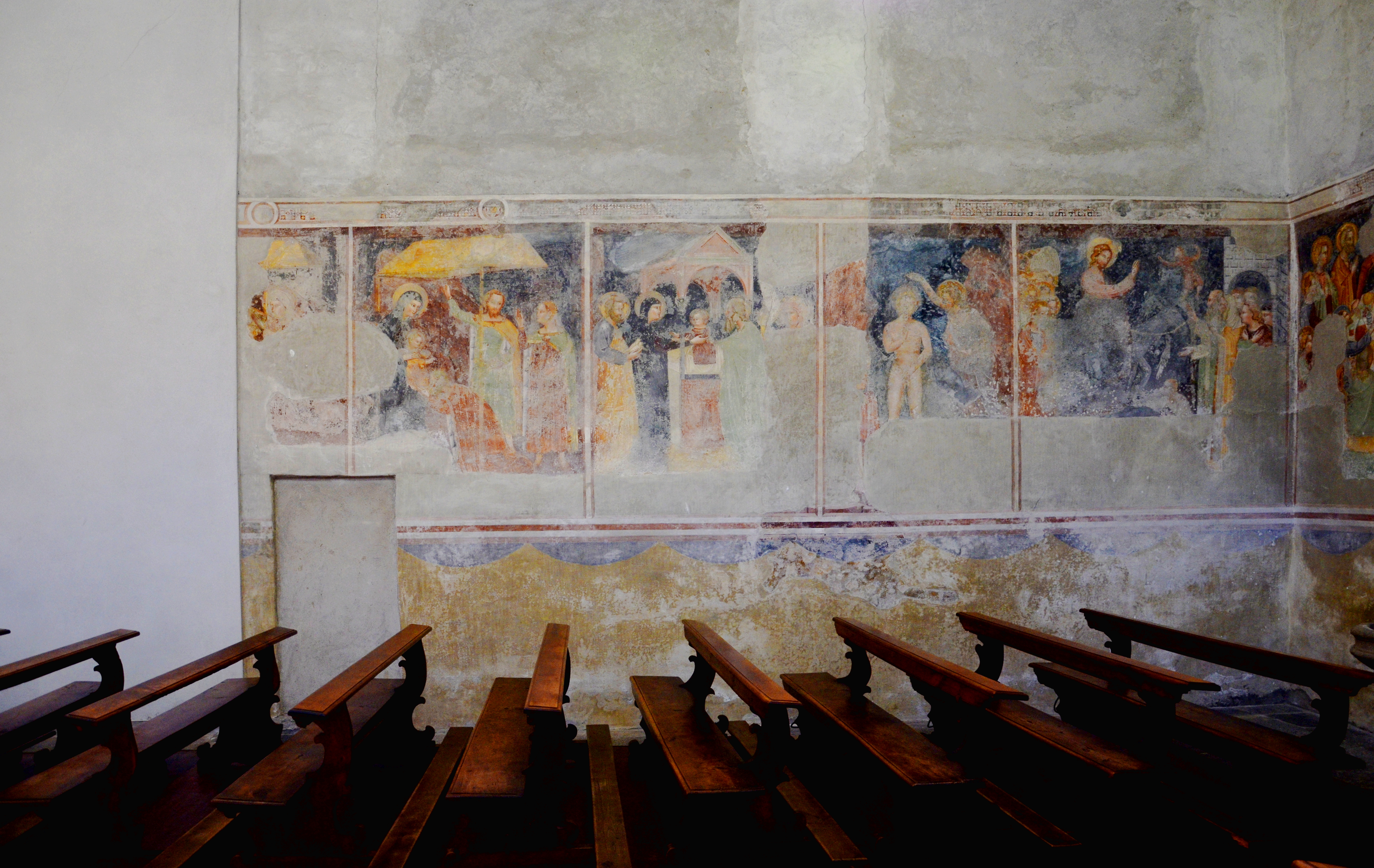 Chiesa parrocchiale di S.Maria Assunta